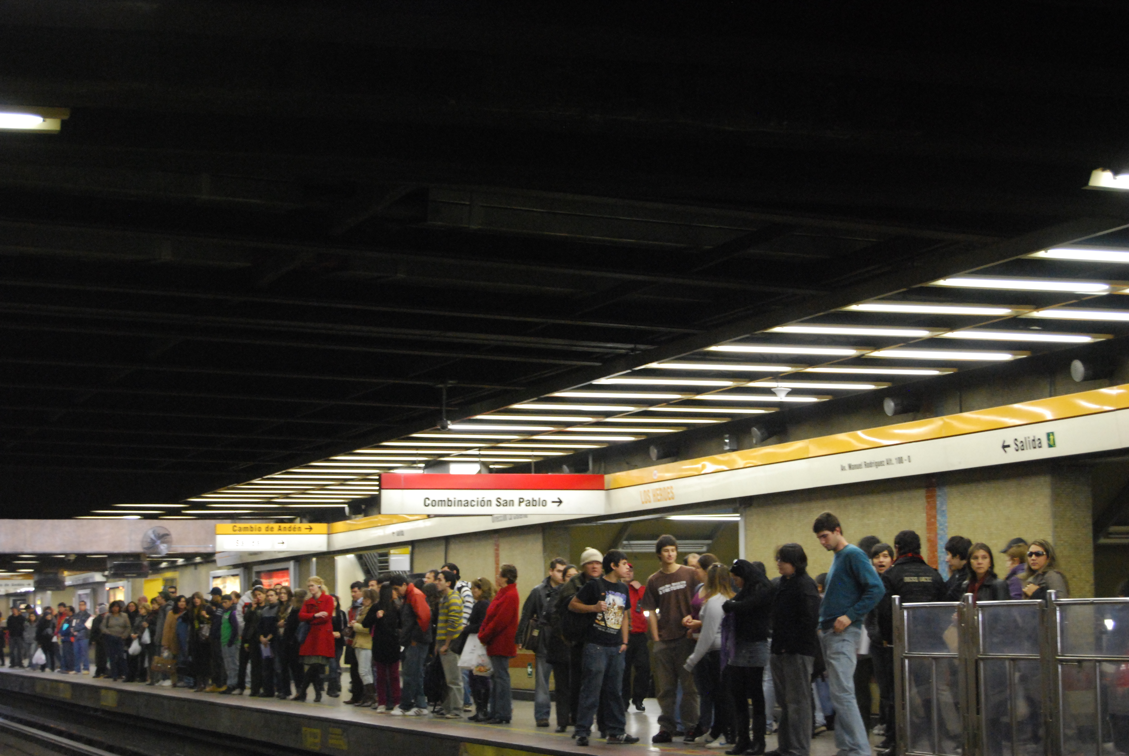 Andén de la estación Los Héroes (Línea 2) del Metro de Santiago.